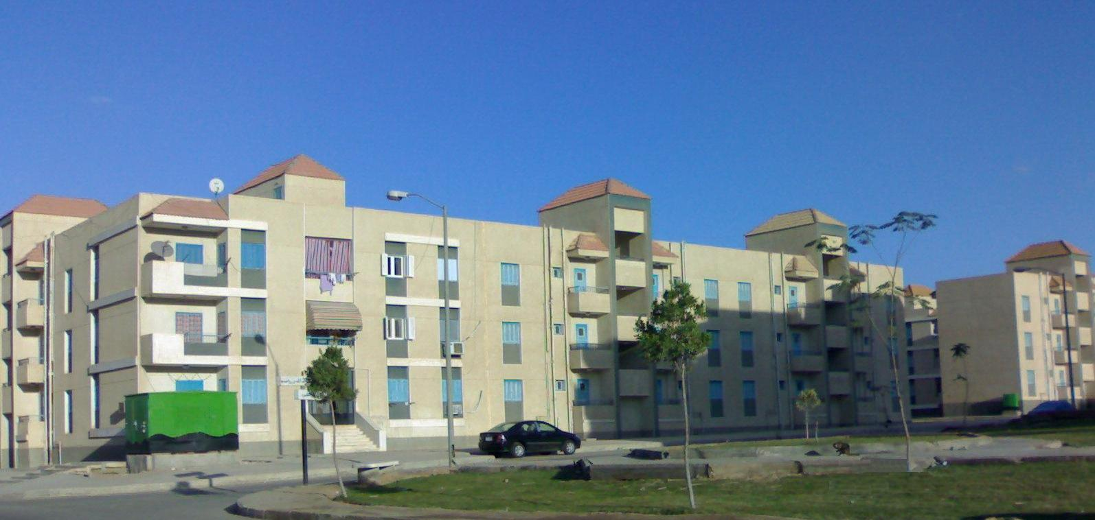 المنطقة السكنية الرابعة-مدينة السادات